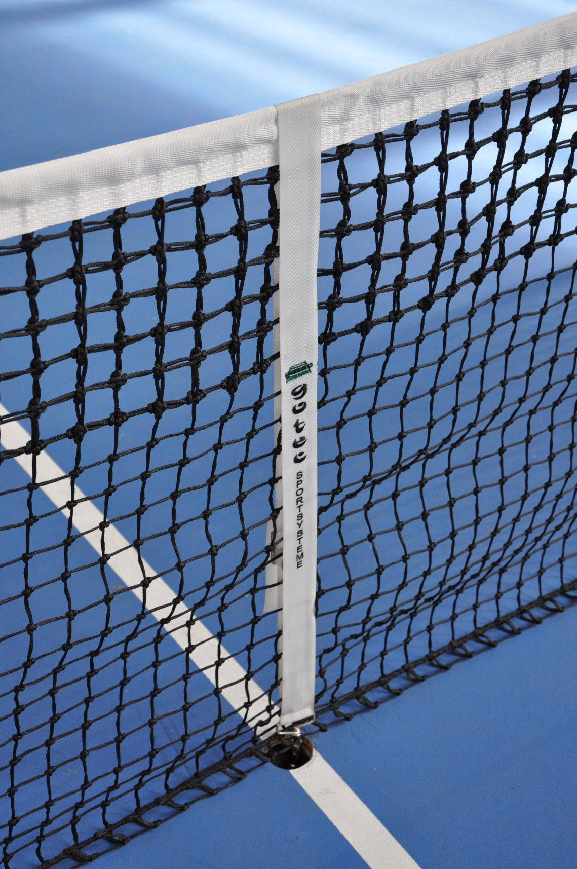 Sangle pour fixation filet de tennis